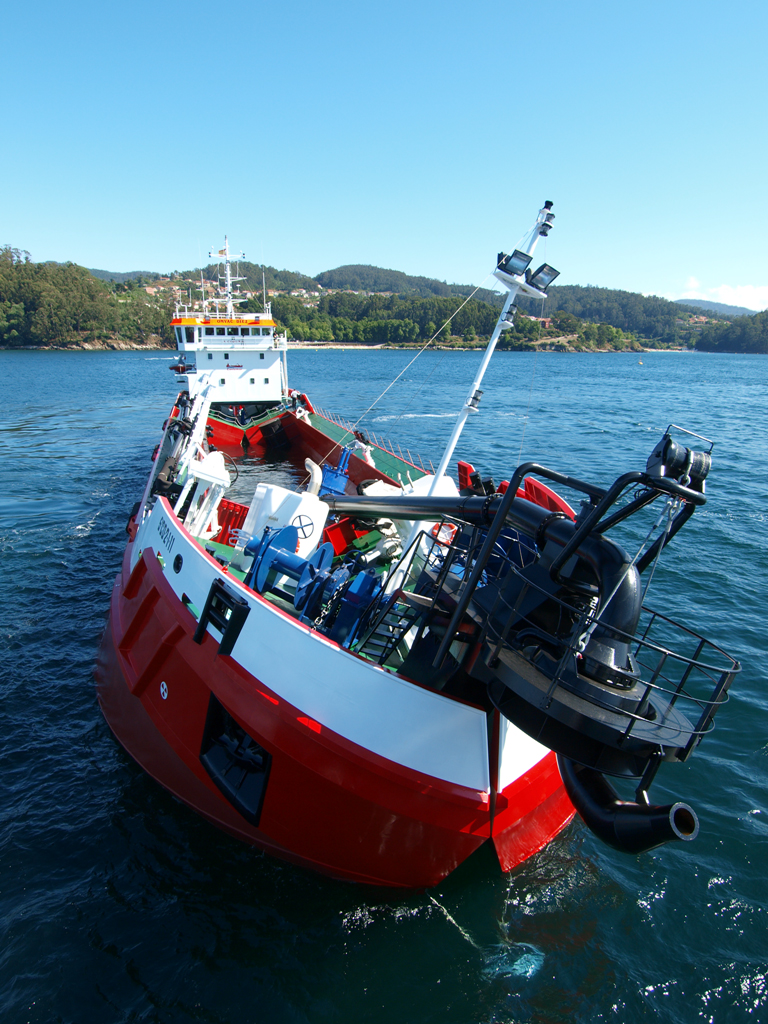 BA 2 OMVAC DIEZ 02